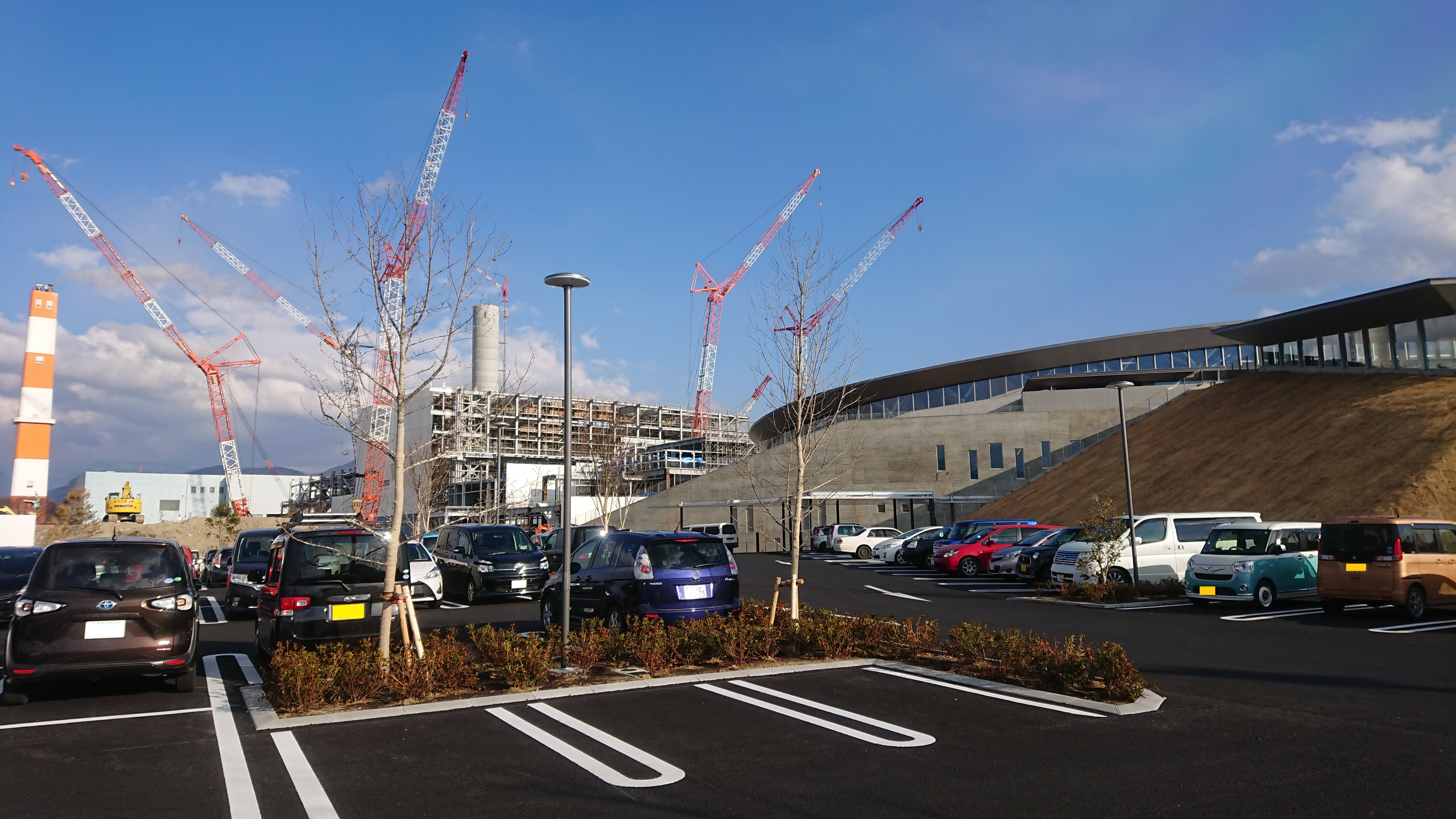 サンマリーンながの・長野市清掃センター（長野県長野市松岡二丁目）